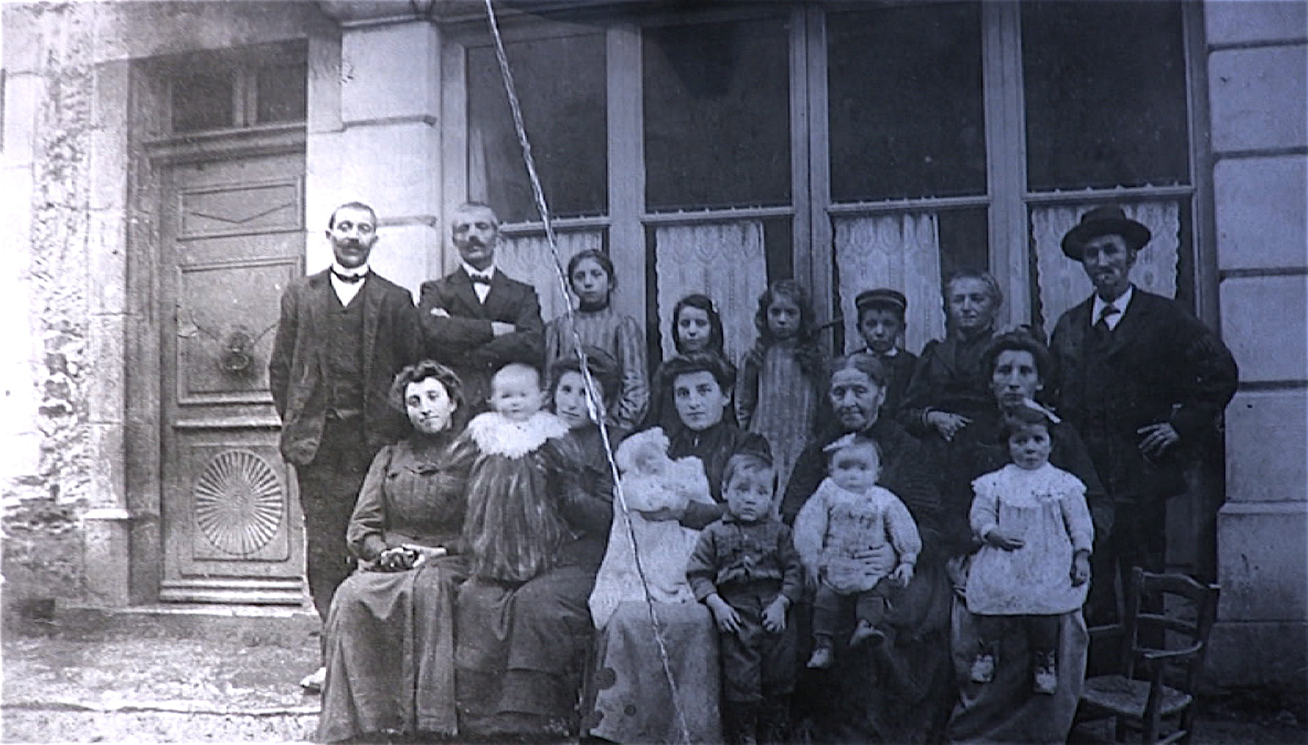 Baptême familles Cayzac Vidal Bouscary (Pomayrols Aveyron France) 1er rang à gauche: Louise Bouscary, Marthe Bouscary, Clémence Bouscary (épouse Cayzac) le bébé Anaïs Cayzac, Marie Joséphine Cayzac, Arthémond Cayzac, Marie Louise Cayzac (Reynaud), Marie Bouscary (épouse Vidal), Germaine Vidal (Vernhettes). 2ème rang à gauche: Antoine Cayzac, Jean-Pierre Célestin Vidal, Célestine Vidal (Nouyrigat), Marie-Louise Bonnal (Carpentier), Marie-Louise Vidal (Brajon), Jean Vidal, Sylvie Bouscary et Pierre Bouscary de Rouveret.